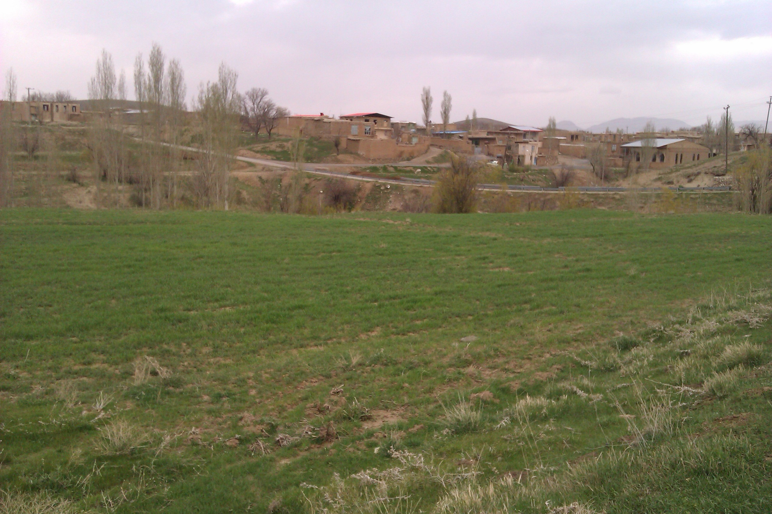 روستای ییلاقی فرج آباد